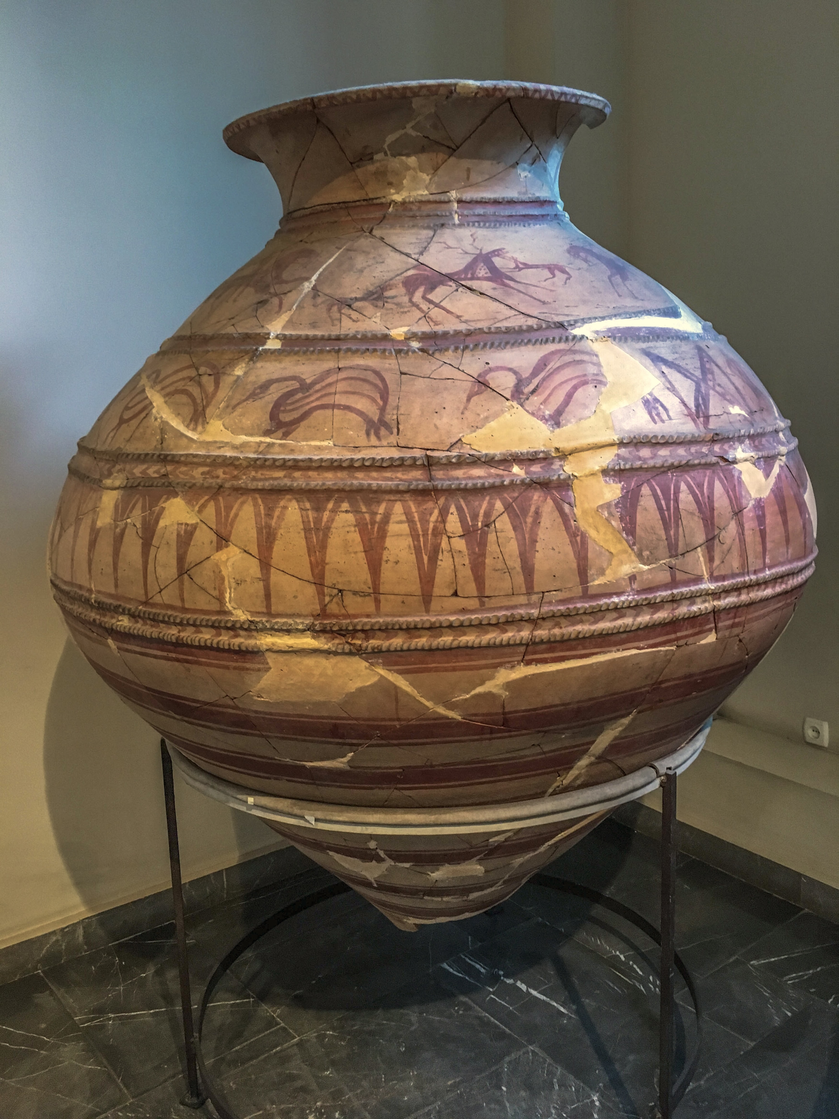 1967-ci ildə Samadlo, Msxeta, Gürcüstan ərazisindən aşkarlanmış böyük saxsı küp.